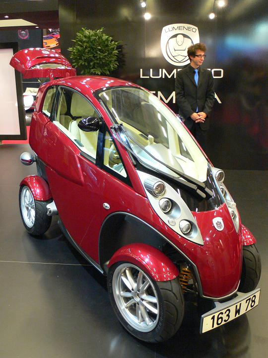 Photo de la Lumeneo Smera